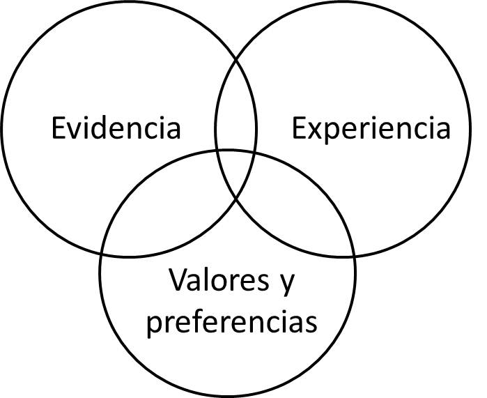 Triada de la medicina basada en la evidencia